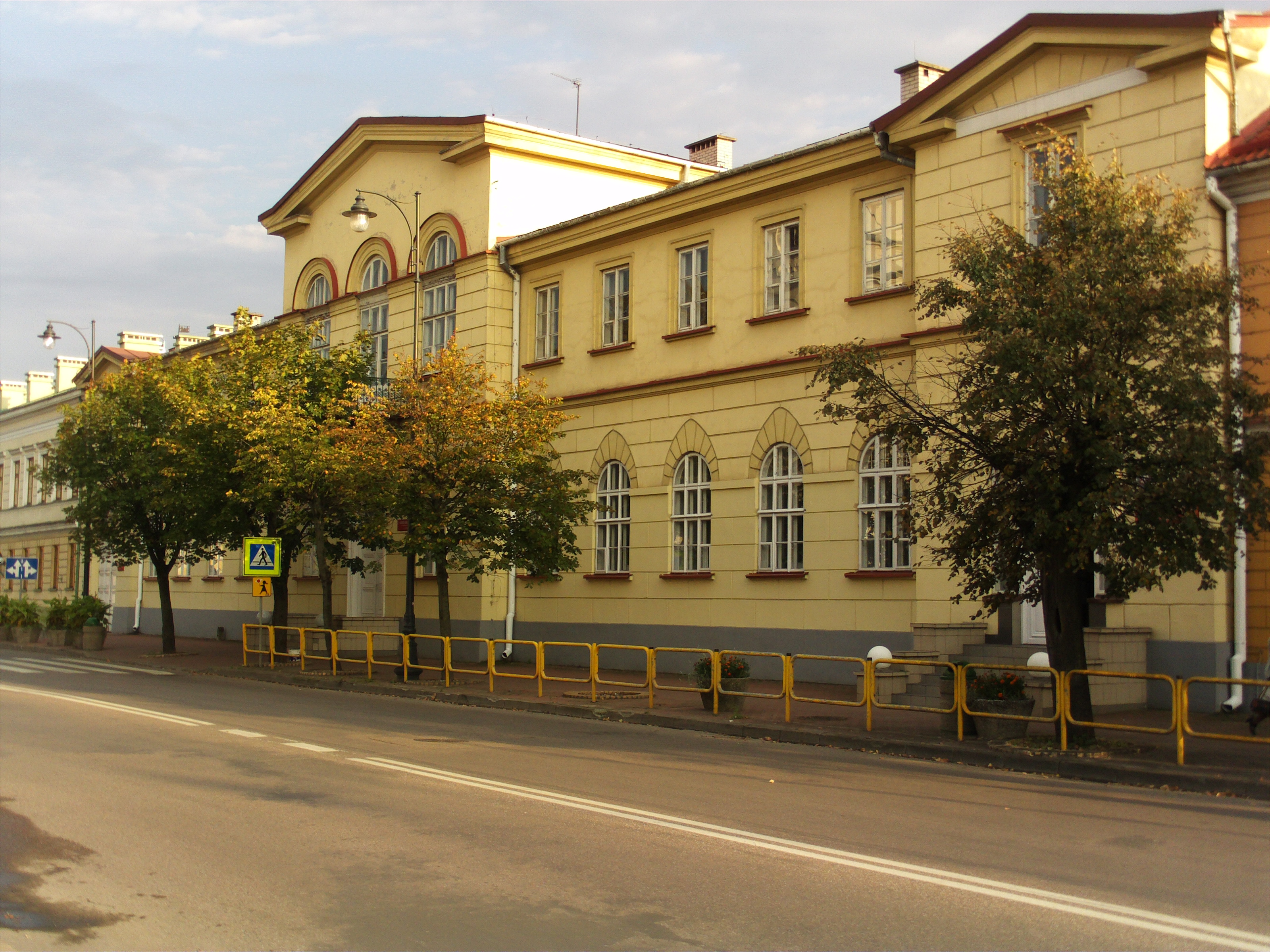 Gimnazjum, ob. LO im. Konopnickiej